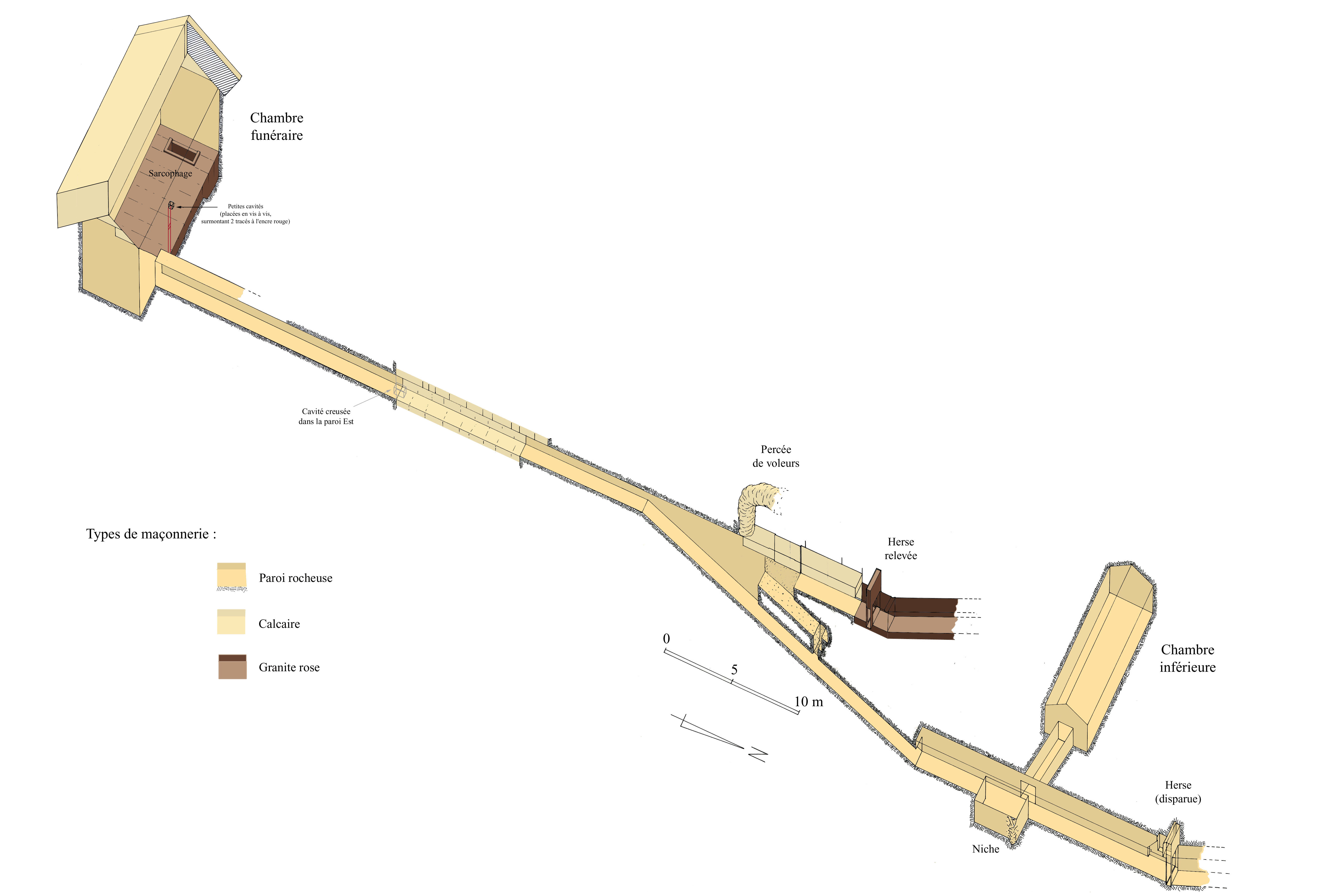 Vue axonométrique des appartements funéraires de Khéphren à Gizeh